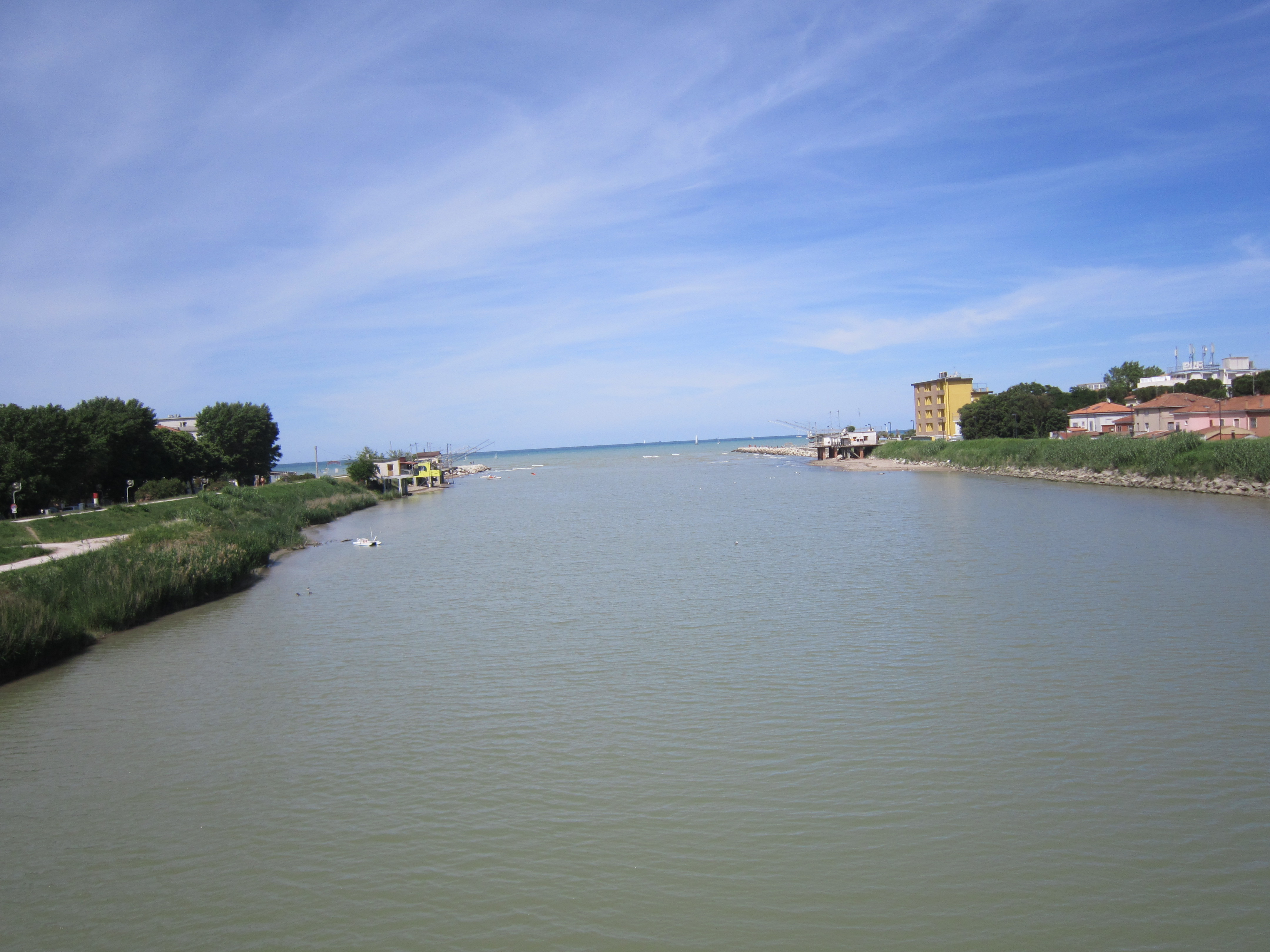 La foce del fiume Marecchia presso Rivabella, frazione di Rimini.